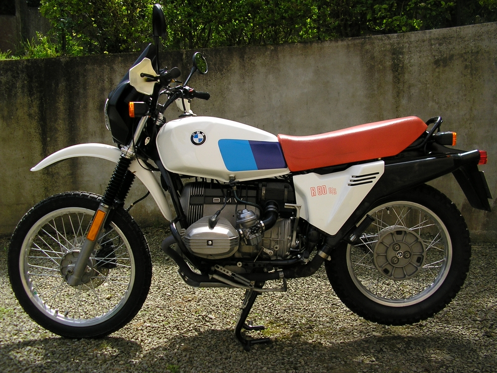 Cette BMW R80 G/S (G/S pour "Gelände/Strasse" en français : "tout-terrain/route") est le premier modèle sorti en 1980. Les rétroviseurs sont d'un modèle de 1985 (ceux de 1981 étaient tout en métal). Le blanc est la seule couleur proposée la première année de commercialisation, le bleu foncé viendra ensuite fin 81 avec une selle noire. La selle rouge n'existe que sur les modèles blancs, la décoration adhésive du réservoir est composée de deux tons de bleu, les modèles d'une autre couleur voient leur réservoir décoré en rouge et bleu. Les options d'origine sur cette moto sont : Les protège-carters, béquille latérale (protège-carters obligatoires car elle se fixe dessus), la montre et le compte-tour. Il existait également en option un porte bagage simple, un porte bagage avec porte valise droit (Uniquement droit) et sa valise (unique) blanche ou noire. Les doubles valises sont sorties plus tard. Les accessoires d'origine BMW pour 80 G/S sur cette moto sont : le sabot de béquille en aluminium, le sabot moteur en aluminium, les caoutchoucs anti-vibrations sur les cales pieds, le rigidificateur de fourche au niveau de la roue avant, le saute vent ainsi que les protèges-mains (Ici, ce sont des ACERBIS de 1985 mais ils sont très similaires à ceux fabriqués par BMW). La plupart de ces accessoires sont sortis vers 1985. La grille de phare est d'époque mais n'est pas d'origine BMW (BMW n'en a jamais fabriqué pour la G/S).